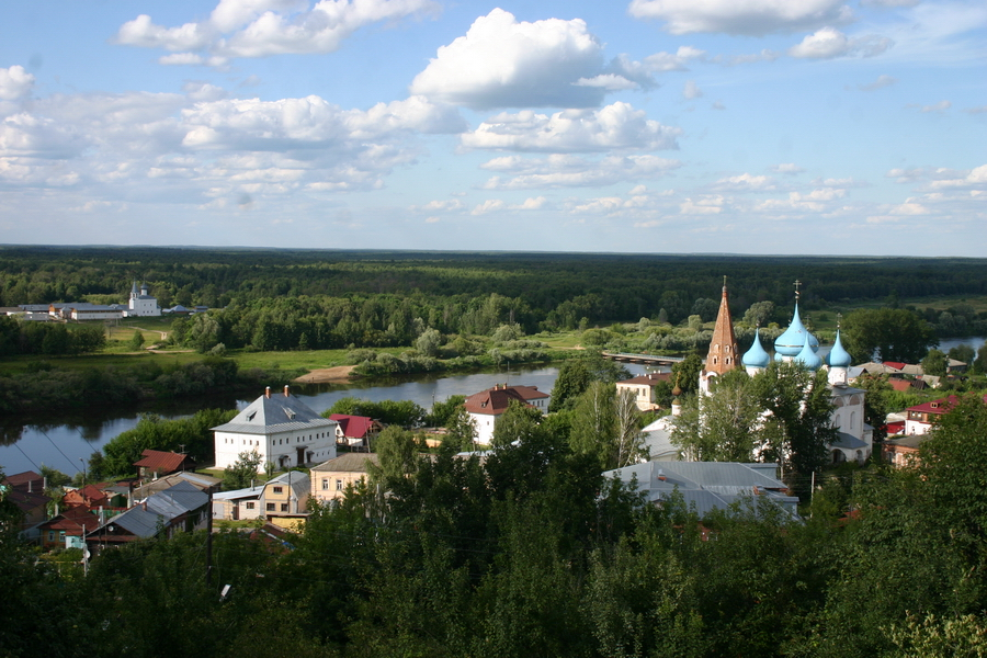 Город Гороховец, XII в. (Владимирская область, Гороховец, автострада "Москва=Горький", ж/д "Москва=Горький")